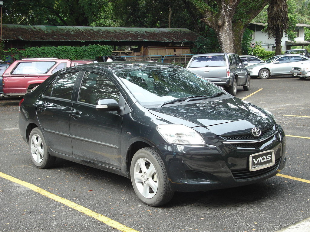 2007 Toyota Vios